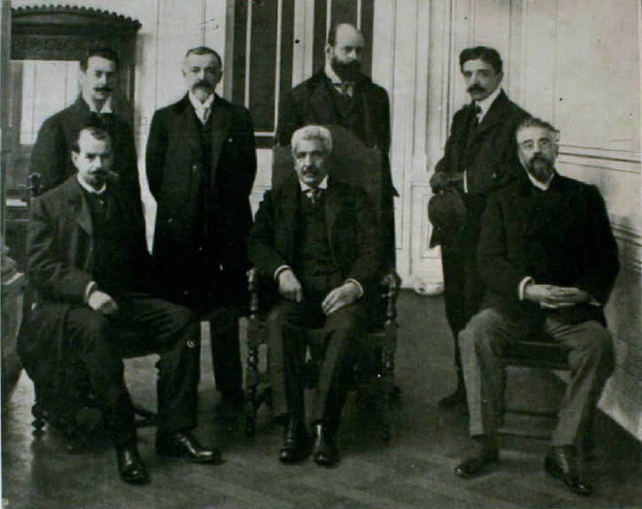 Gabinete del Presidente de Chile Pedro Montt: de pie de izquierda a derecha Alejandro Lira, Gonzalo Urrejola, Emiliano Figueroa, Guillermo Subercaseaux. Sentados de izquierda a derecha: Luis A. Vergara, El Presidente Montt y Federico Puga Borne.